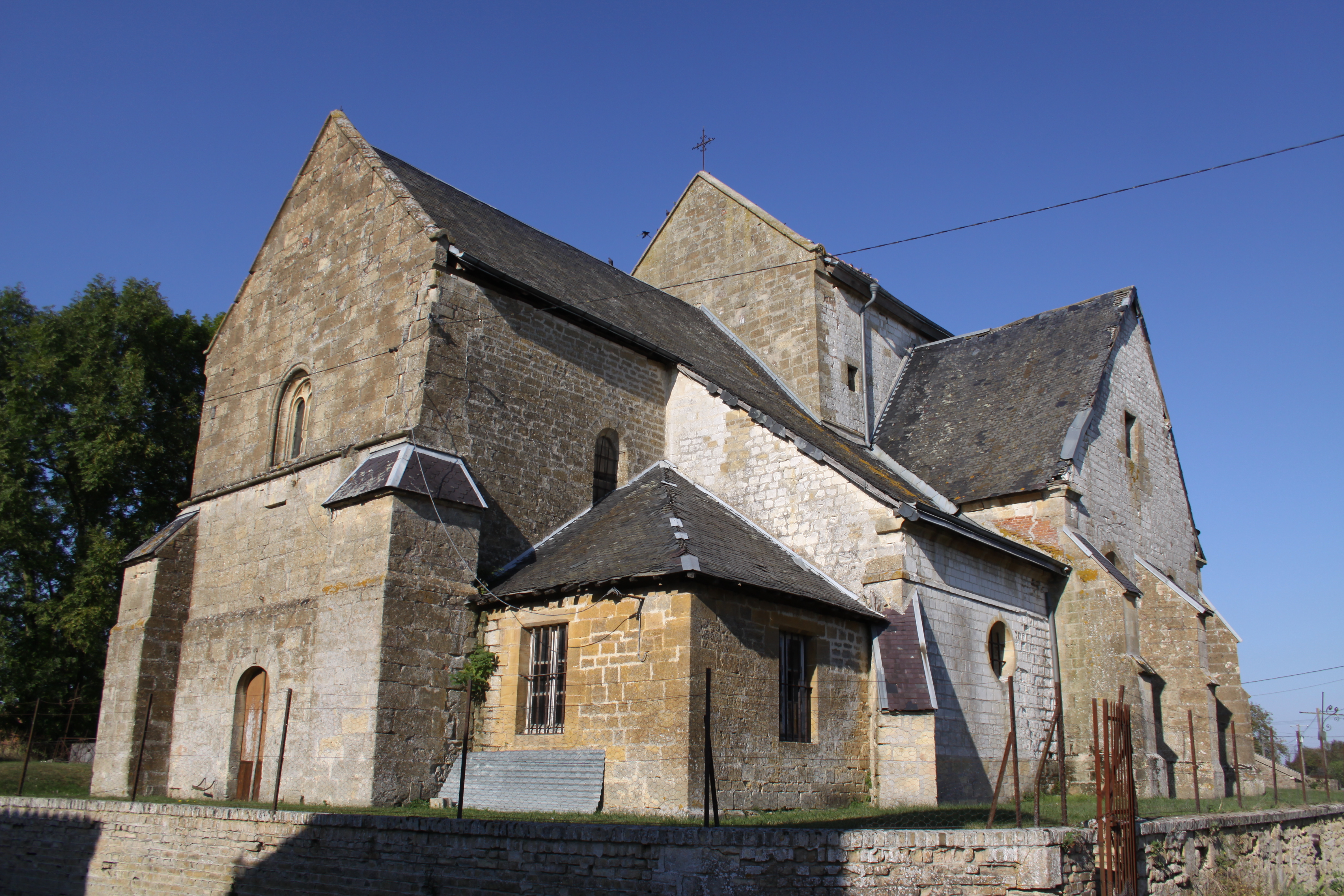 Église Saint-Pierre de Chuffilly-Roche (Ardennes, France) .